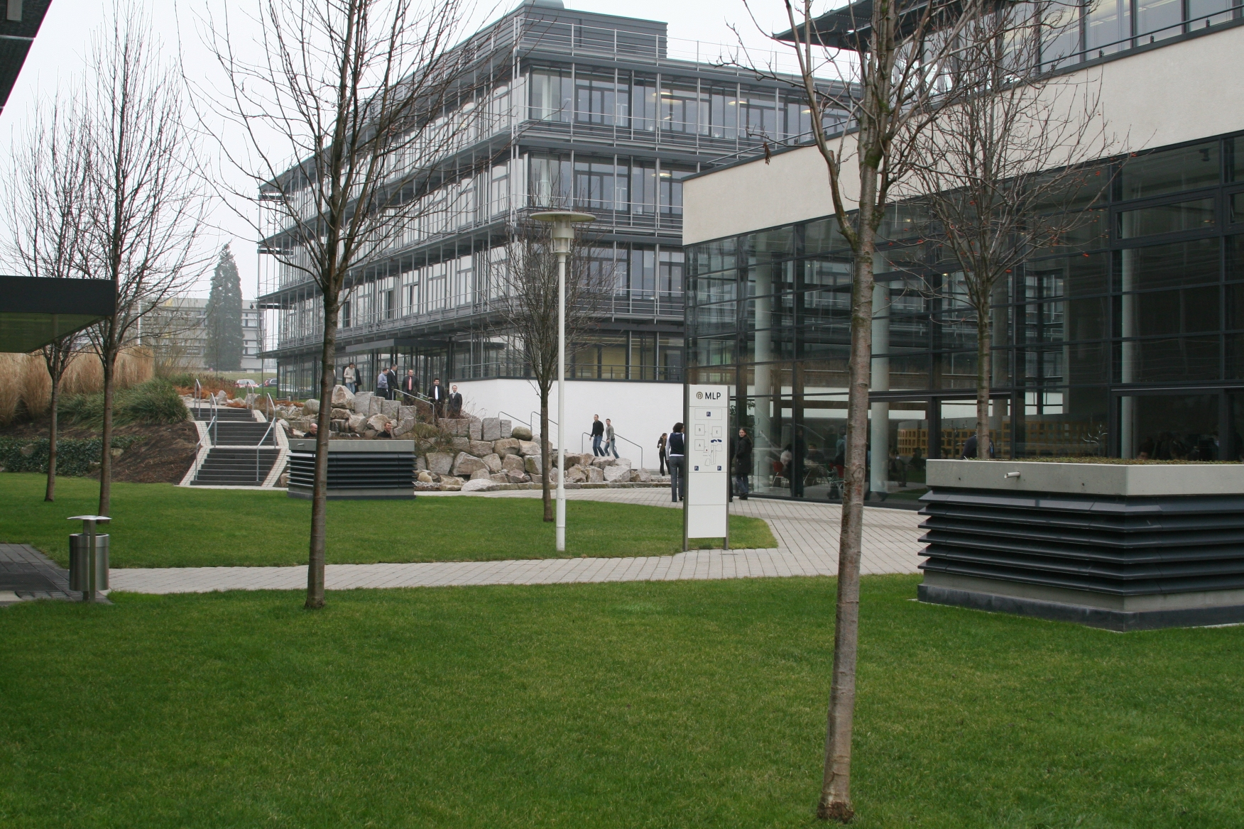 MLP-Firmensitz in Wiesloch